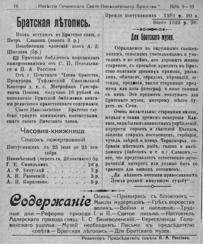 Обращение Сочинского Св.Ник.Братства к созданию музея